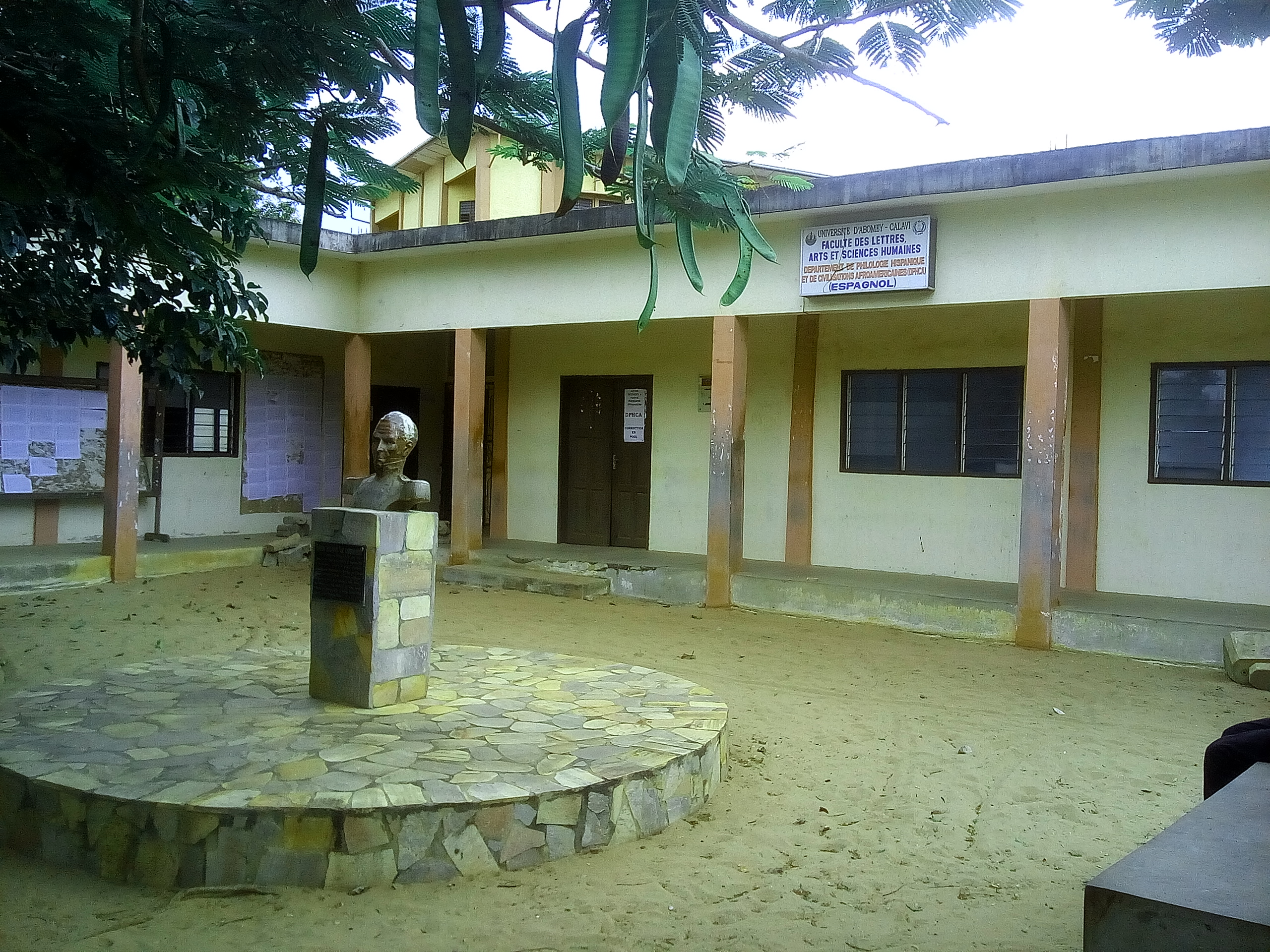 département sur le campus